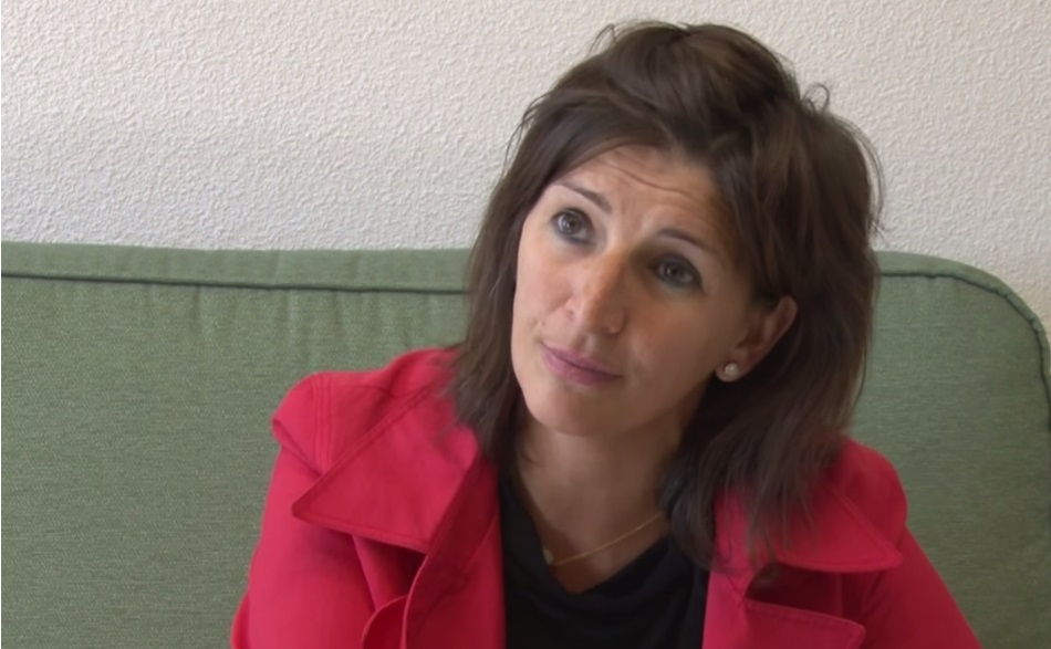 Yolanda Díaz